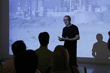 Albert Bayona. Presentació del projecte Monday to Friday Dijous, 17 de juliol de 2008 a les 19:30h. Un audiovisual sobre l’alteració del medi ambient i la intervenció humana en el paisatge mitjançant elements aliens, recreats per tècniques digitals que incrementen la incoherència de les escenes, filmades en entorns degradats, buscats per a tal efecte, i no per això menys normals i quotidians. Cinc històries conceptualment unificades en el seu desenllaç, ubicades irònicament en els cinc dies feiners de la setmana.